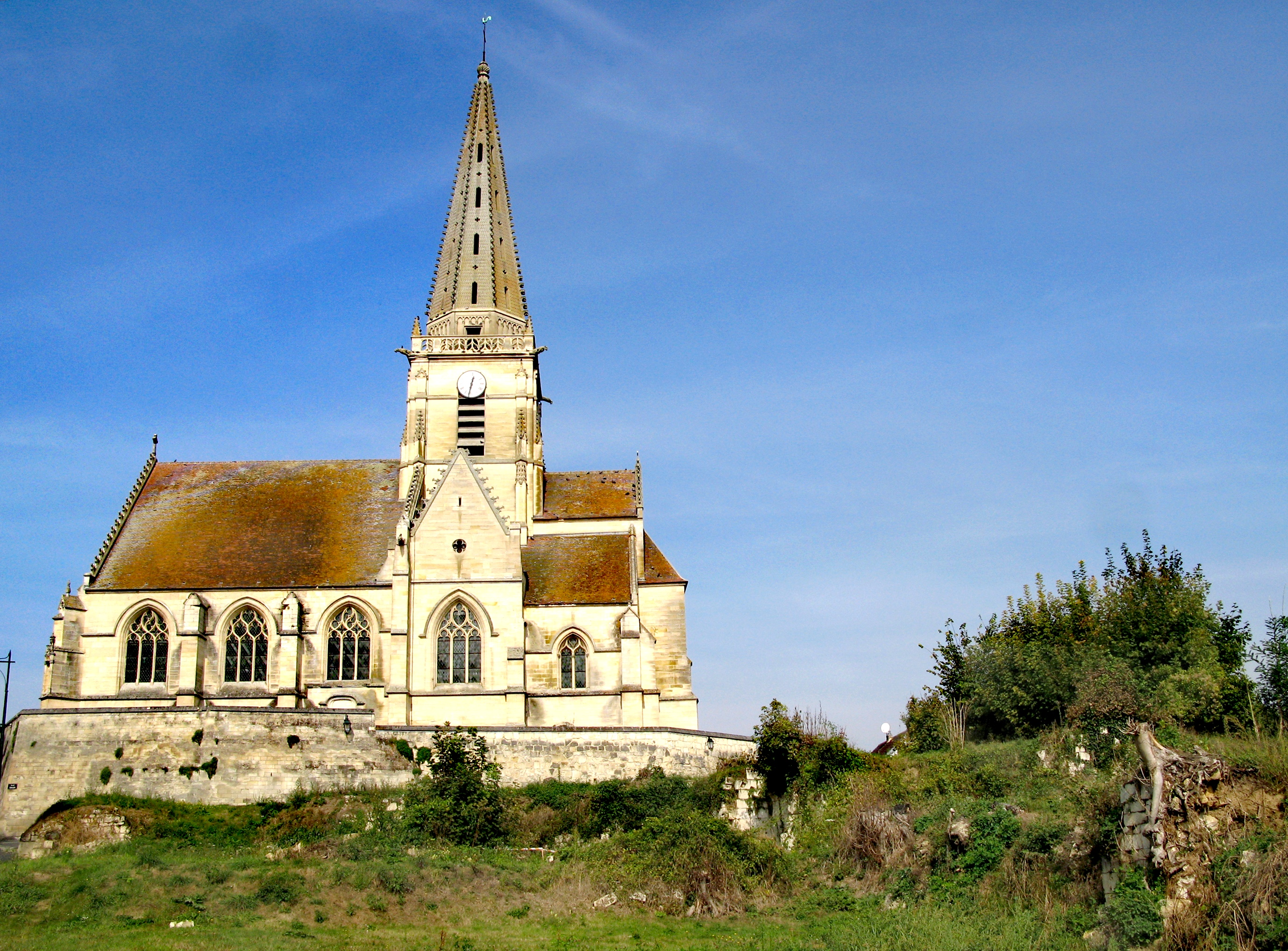 Autrêches (Oise, France) - L'église. La vue sur le flanc Sud de l'église est dégagée. Des traces de constructions en contrebas de l'édifice sont encore nettement visibles en septembre 2009. .